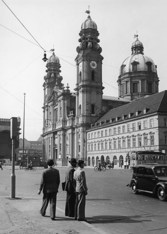 München Theatinerkirche